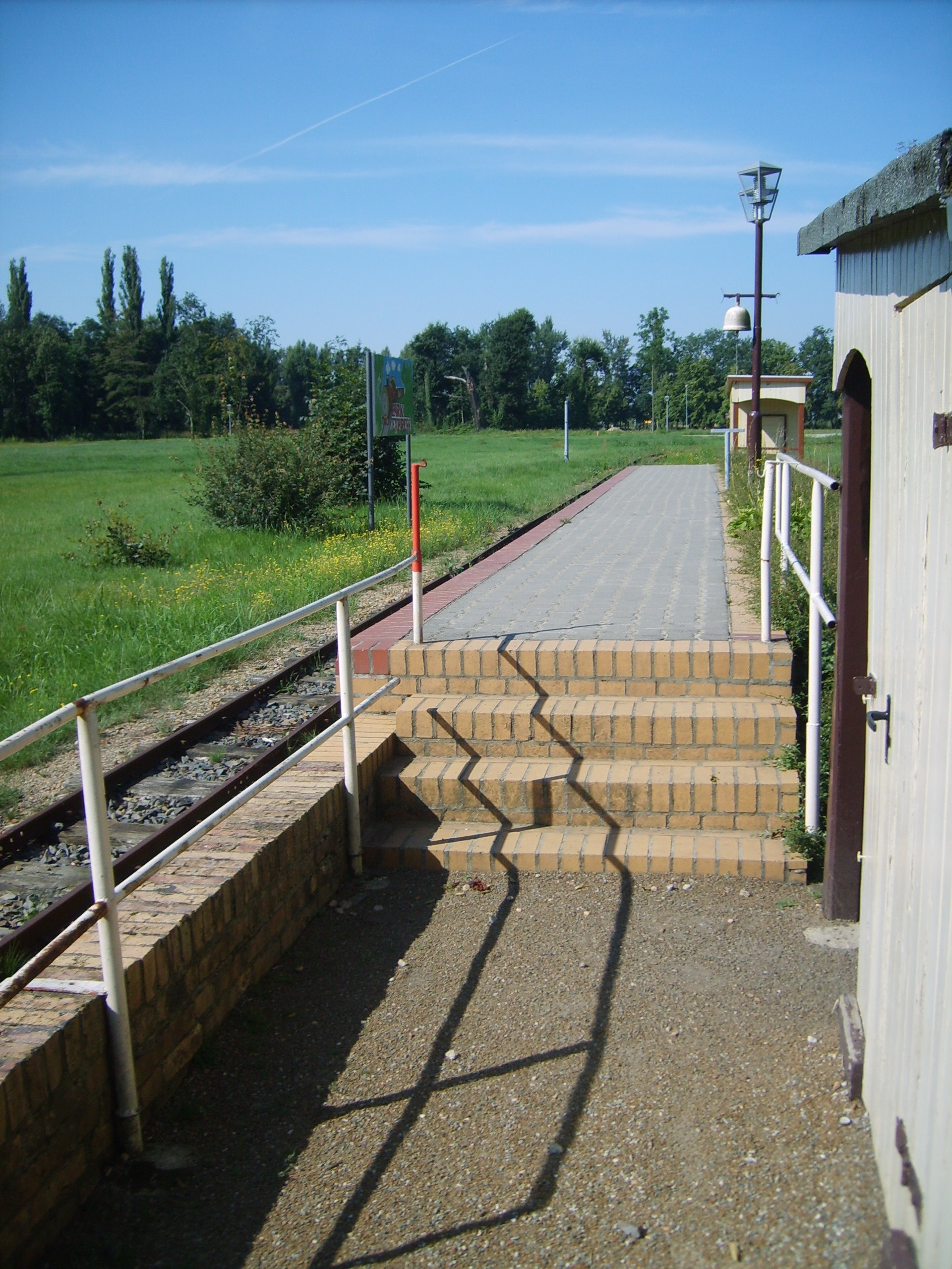 Station der Parkbahn im Schlosspark Lauchhammer-West